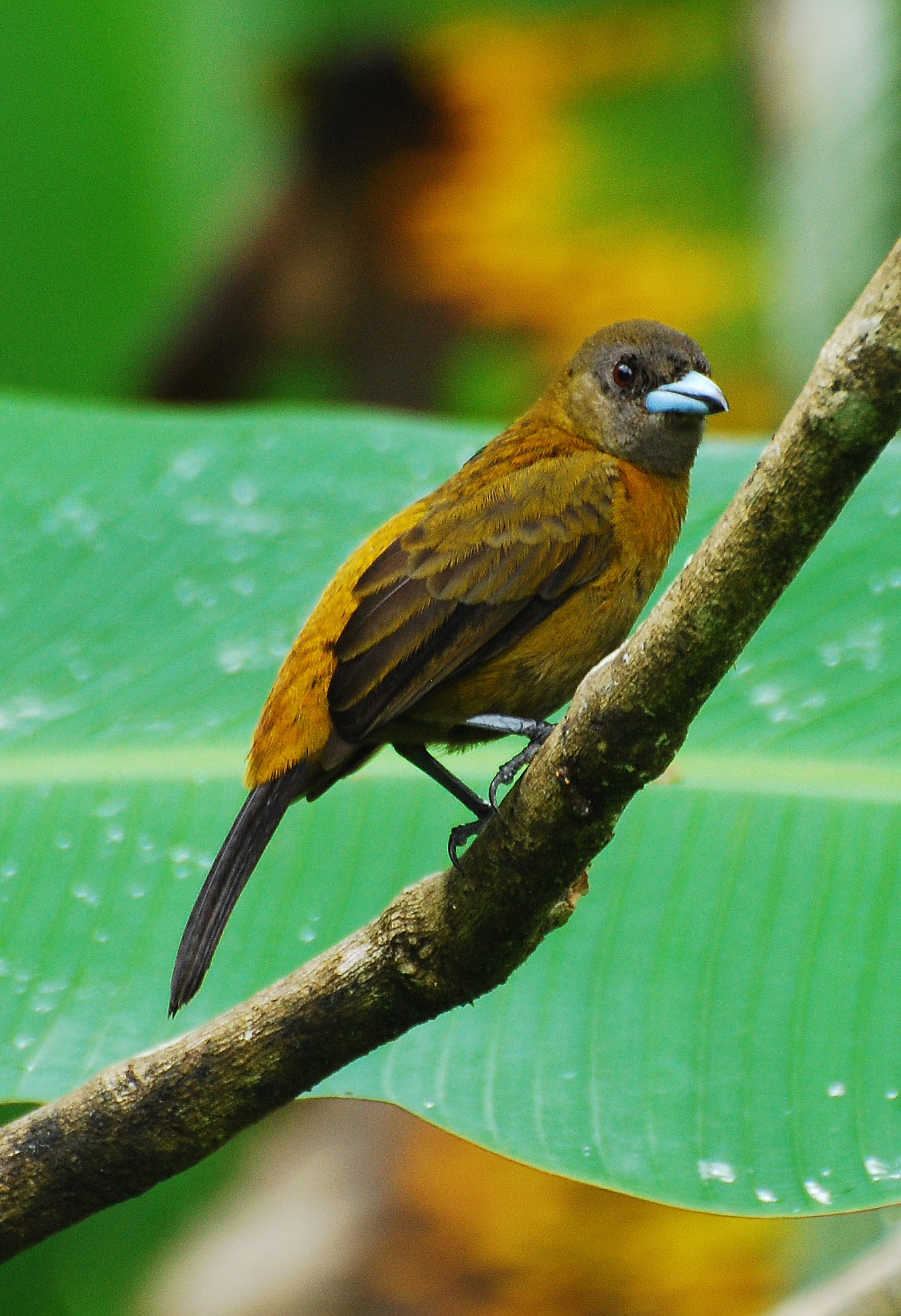 Passerini's Tanager at Selva Verde Lodge, Costa Rica, 080225. Ramphocelus passerinii.